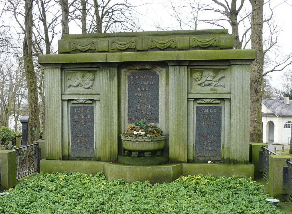 Familiengrab von Hermann Hugo Stinnes / Hugo Stinnes, Mülheim an der Ruhr, alter Friedhof (Altstadtfriedhof) This is a photograph of an architectural monument.